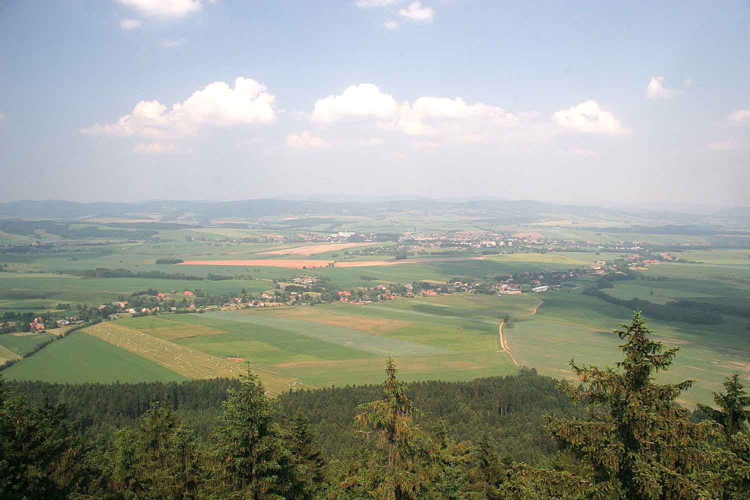 Vyhlídka Supí koš v NPR Broumovské stěny - pohled k Broumovu